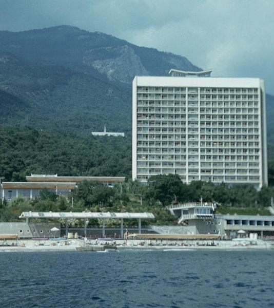 Санаторий «Ай-Даниль» в Ялте архитектор М. Ю. Заполь (1975, премия Совета Министров СССР, 1977)